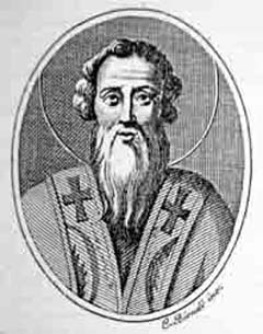 Foto che ritrae San Gregorio II di Agrigento